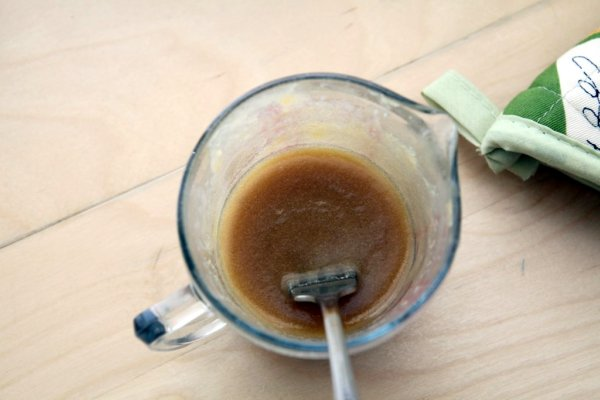 Just like Clinton St. Bakery